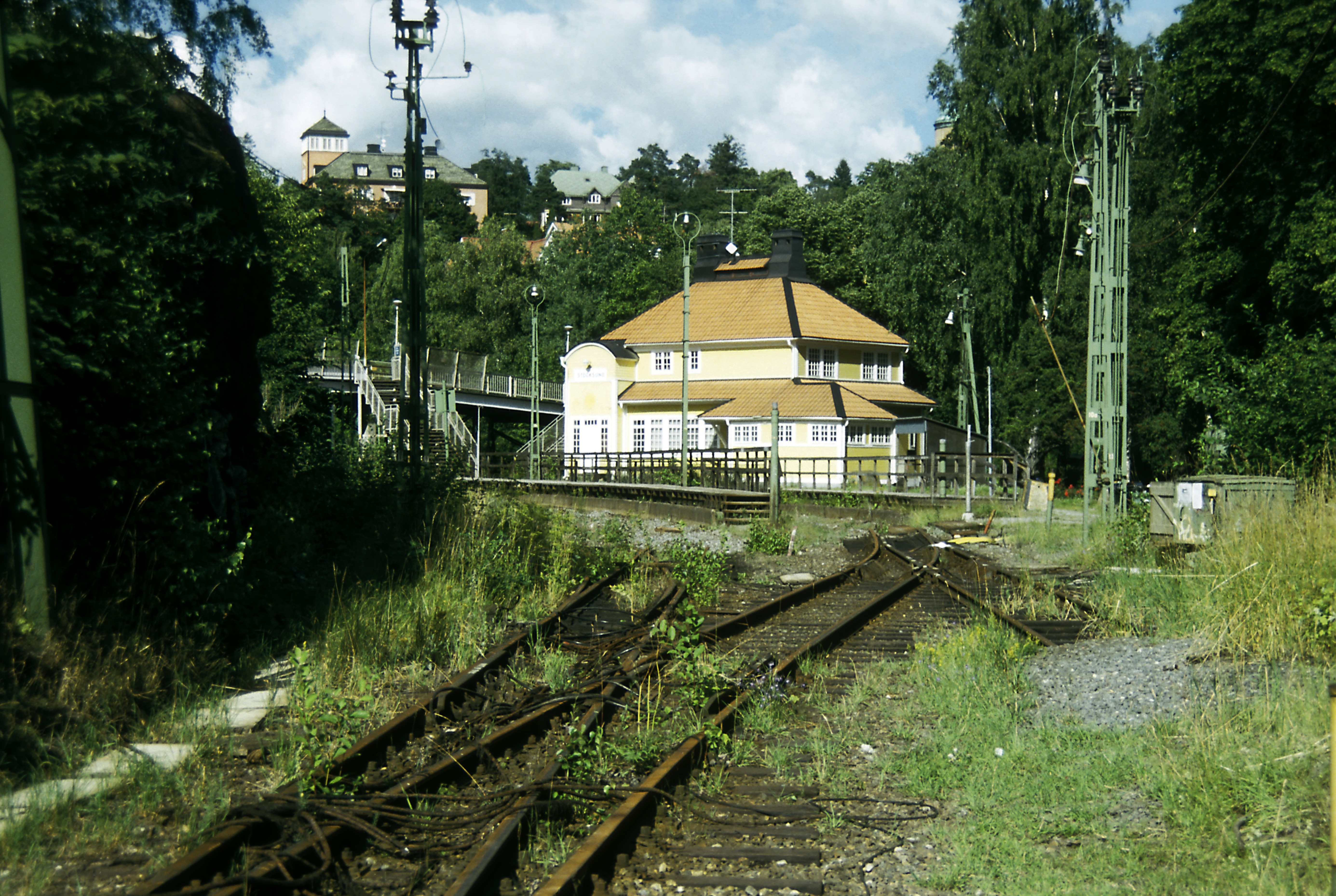 Beim Abbau der Anlagen nach der Neutrassierung. Für den Bahnhof Stocksund gibt es jetzt einen Haltepunkt am Bengt Färjares väg an durchgehend zweigleisiger Strecke.